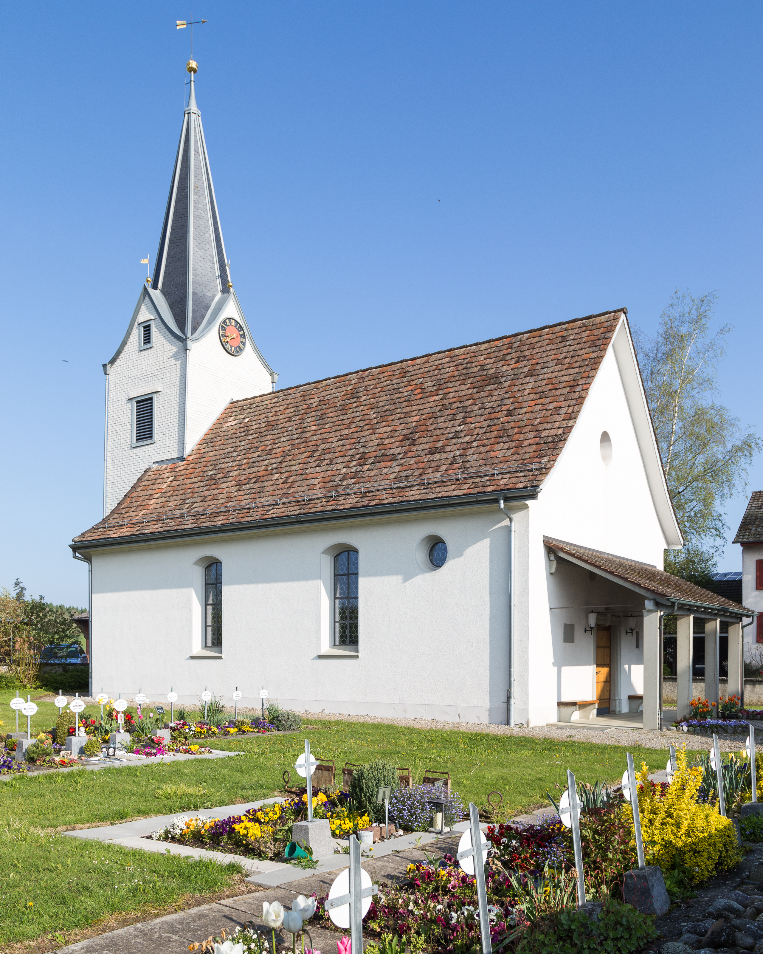 Evangelische Kirche in Wäldi